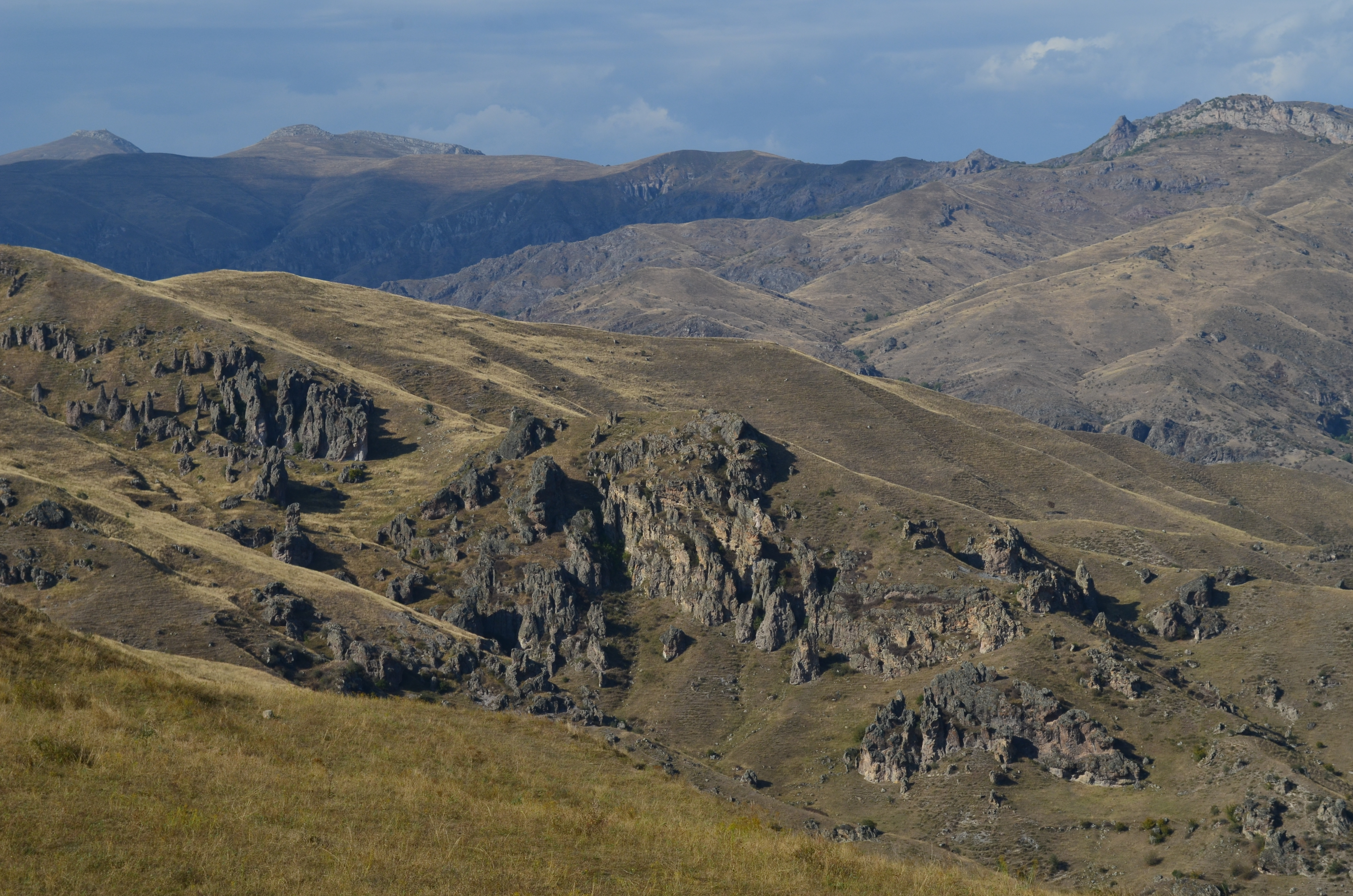 «Անանուն» էրոզիոն ռելիեֆ1